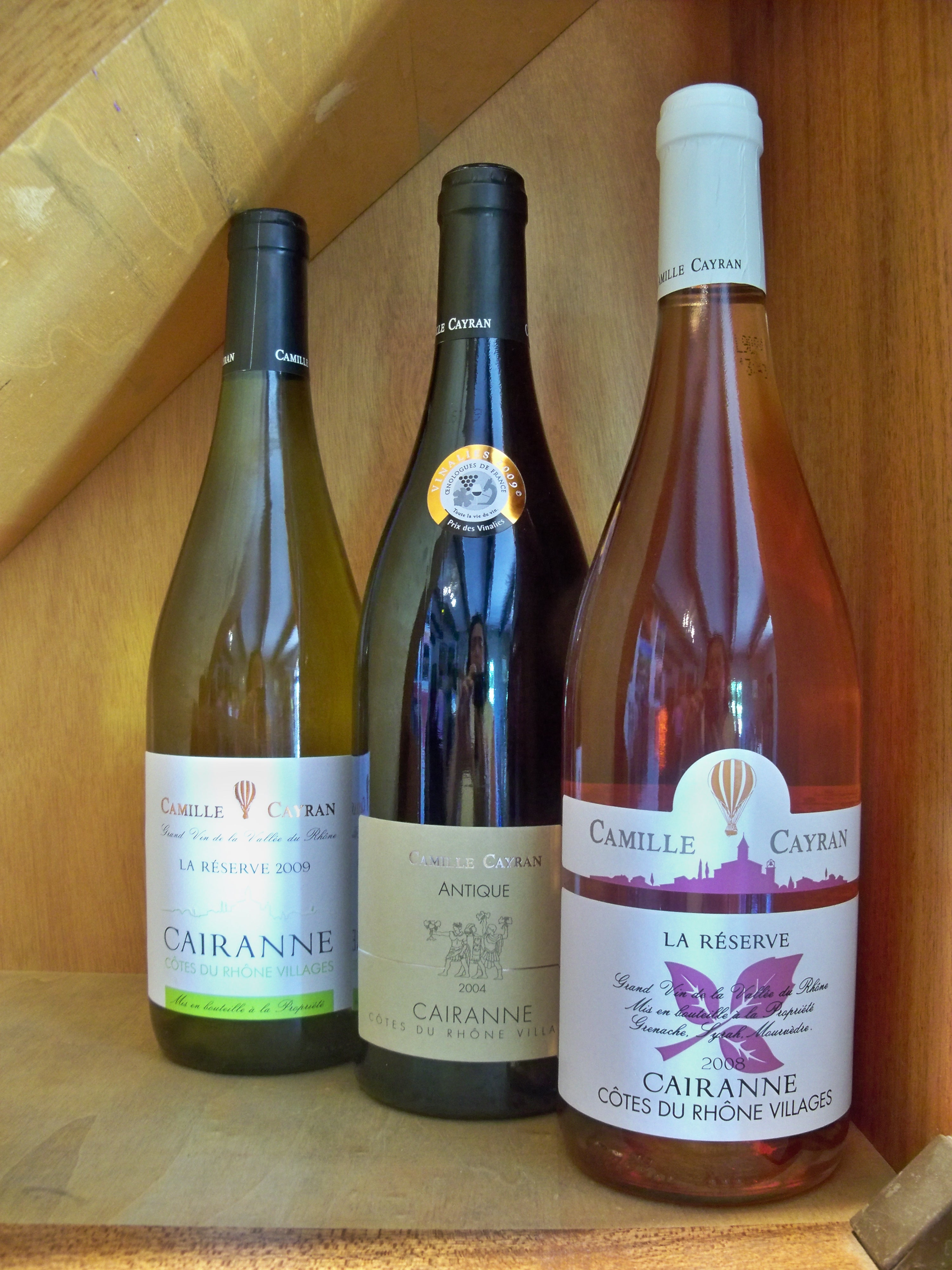 bouteille d'AOC Cairanne